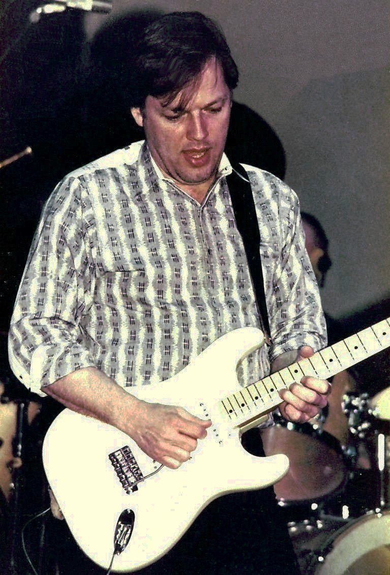 David Gilmour actuando en 1984 durante la gira de p`romoción de su álbum About Face.